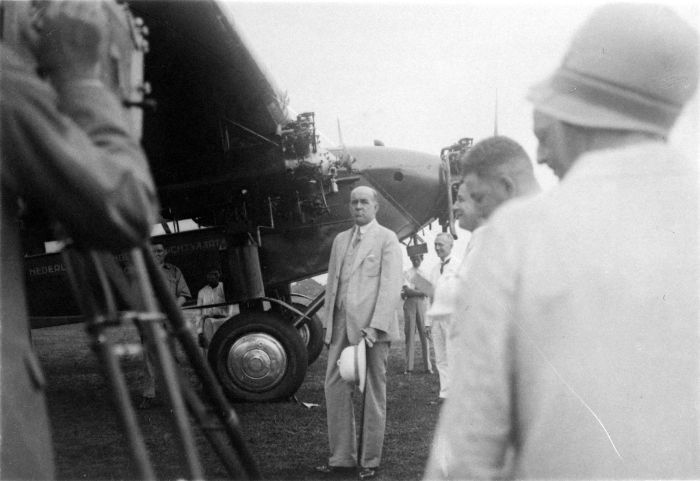 Repronegatief. De opening van de eerste binnenlandse luchtlijn liet na de eerste vlucht Nederland-Indië slechts vier jaar op zich wachten. De lijn Batavia-Semarang-Bandoeng werd uitgevoerd door de Koninklijke Nederlandsch-Indische Luchtvaart Maatschappij, opgezet met steun van het gouvernement. Door de Crisis van 1929 zou de KNILM echter al snel in moeilijkheden komen. De KNILM vloog overigens ook op Singapore, Saigon en Australië. Op de foto Gouverneur-Generaal Jonkheer Mr. A.C.D. de Graeff. (P. Boomgaard, 2001). Opening van de eerste luchtlijn van de K.N.I.L.M. op Semarang en Bandoeng in november 1928 in aanwezigheid van gouverneur-generaal Jhr.Mr. A.C.D. de Graeff op vliegveld Tjililitan bij Batavia, Java